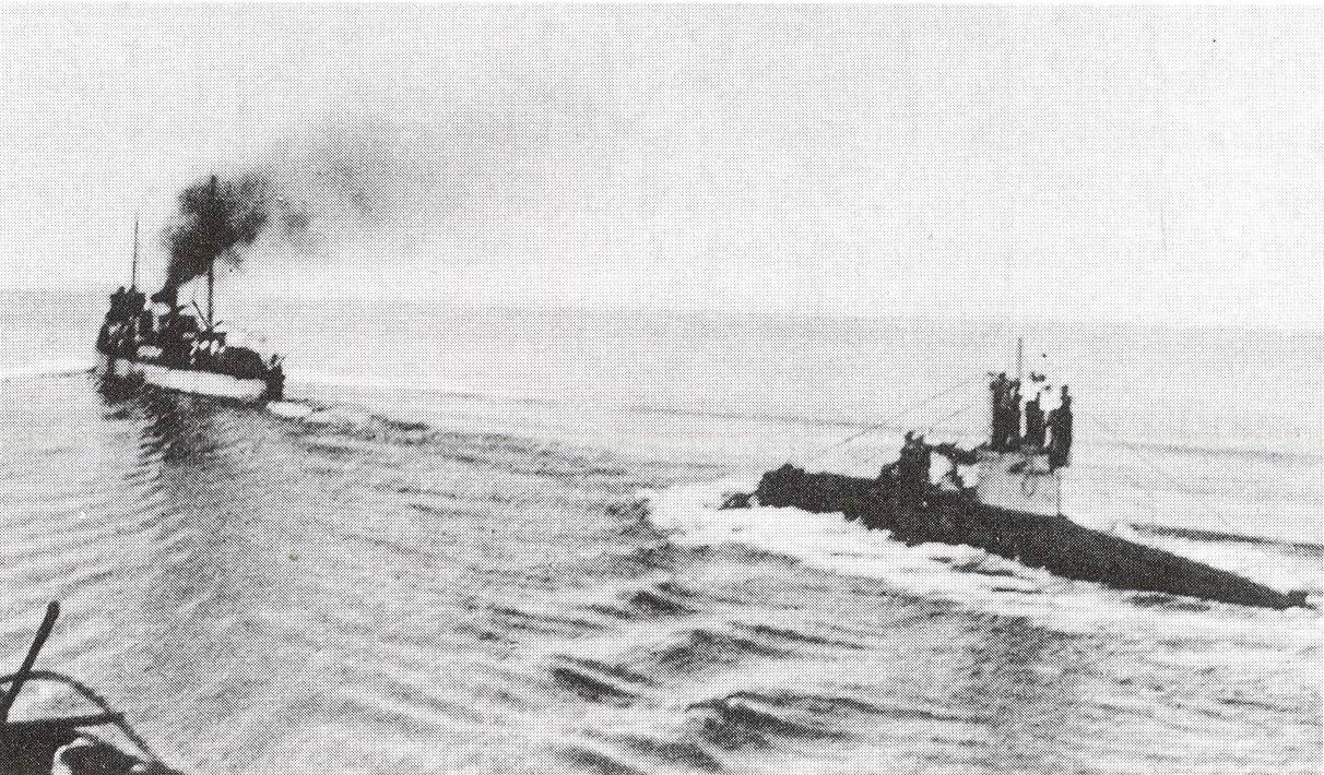 Wegen der geringen Reichweite und Geschwindigkeit der kleinen Küsten *U-Boote der UB-I Klasse ((2,500 km @ 10 kn) wurde Sie oft zu Ihren Einsatzorten geschleppt. Im Bild UB-14 wird von Kotor (heute Montenegro) zur Straße von Ottranto geschleppt